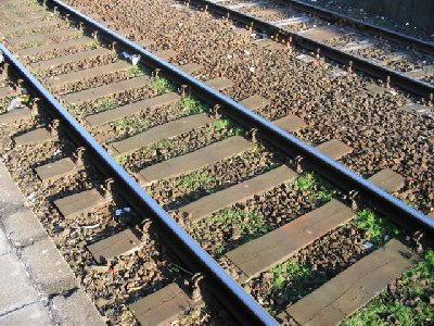 Gleis mit Holzschwellen im Schotterbett